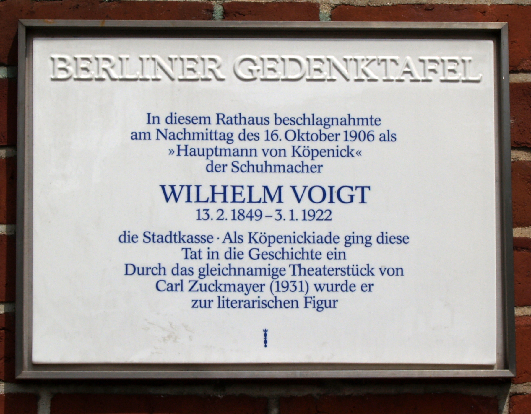 Berliner Gedenktafel am Rathaus Köpenick über den Schuster Wilhelm Voigt, der als "Hauptmann von Köpenick" bekannt wurde